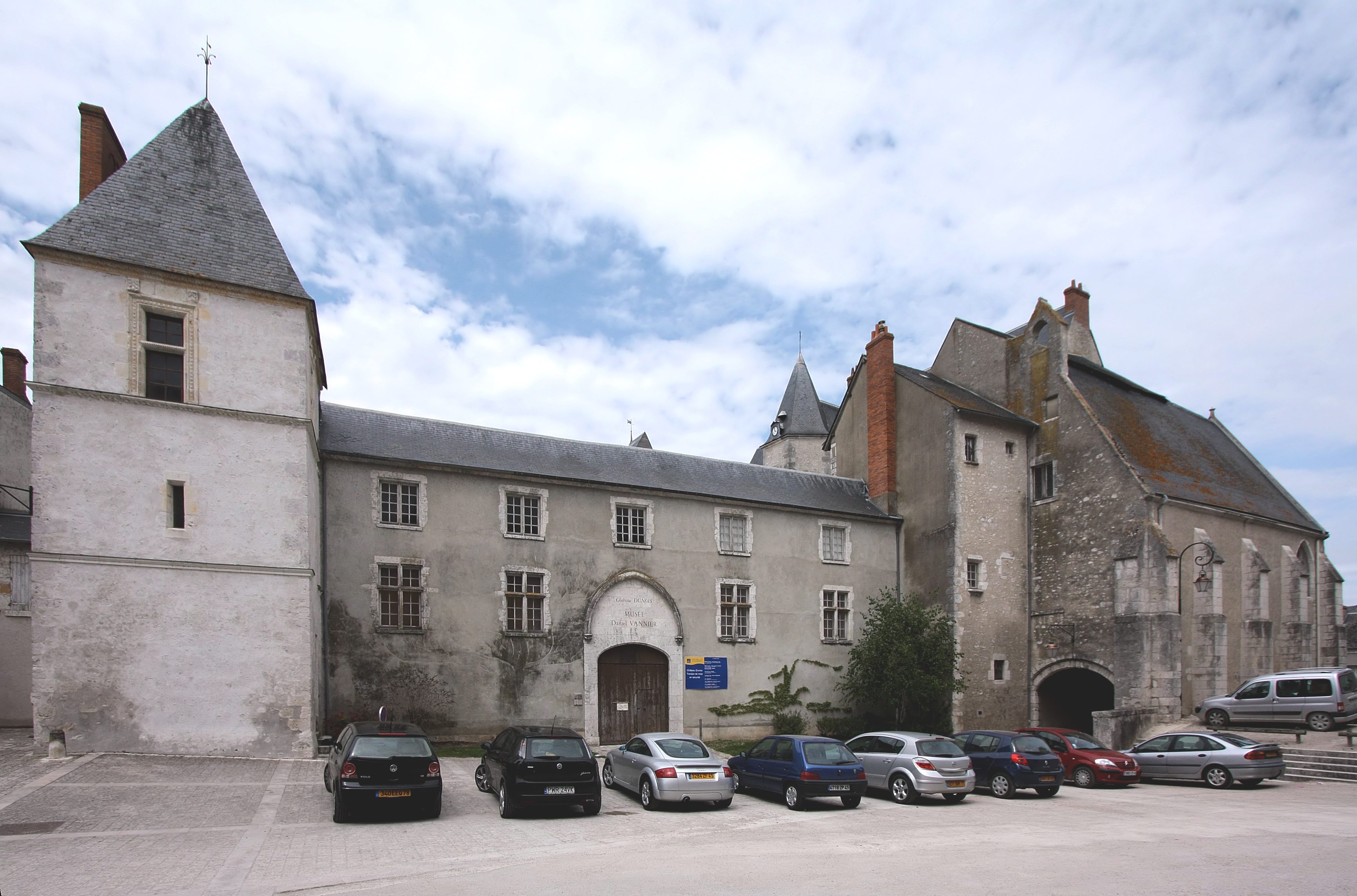 Beaugency, Ortschaft im Département Loiret/Frankreich - Aussenansicht von Schloss Dunois, dem Logis der Burg Beaugency